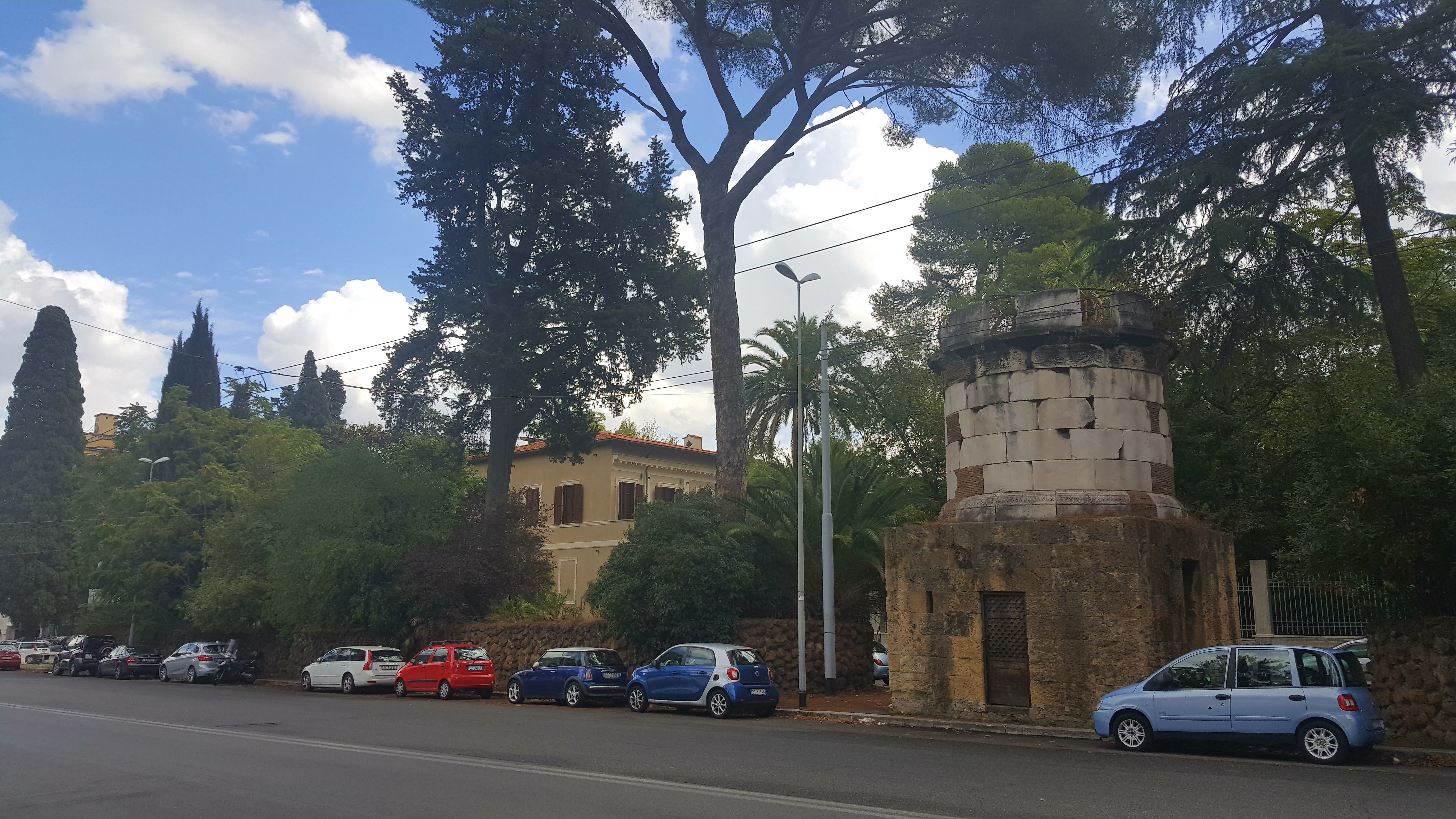 Mausoleo sulla via Nomentana, di fronte a Villa Blanc